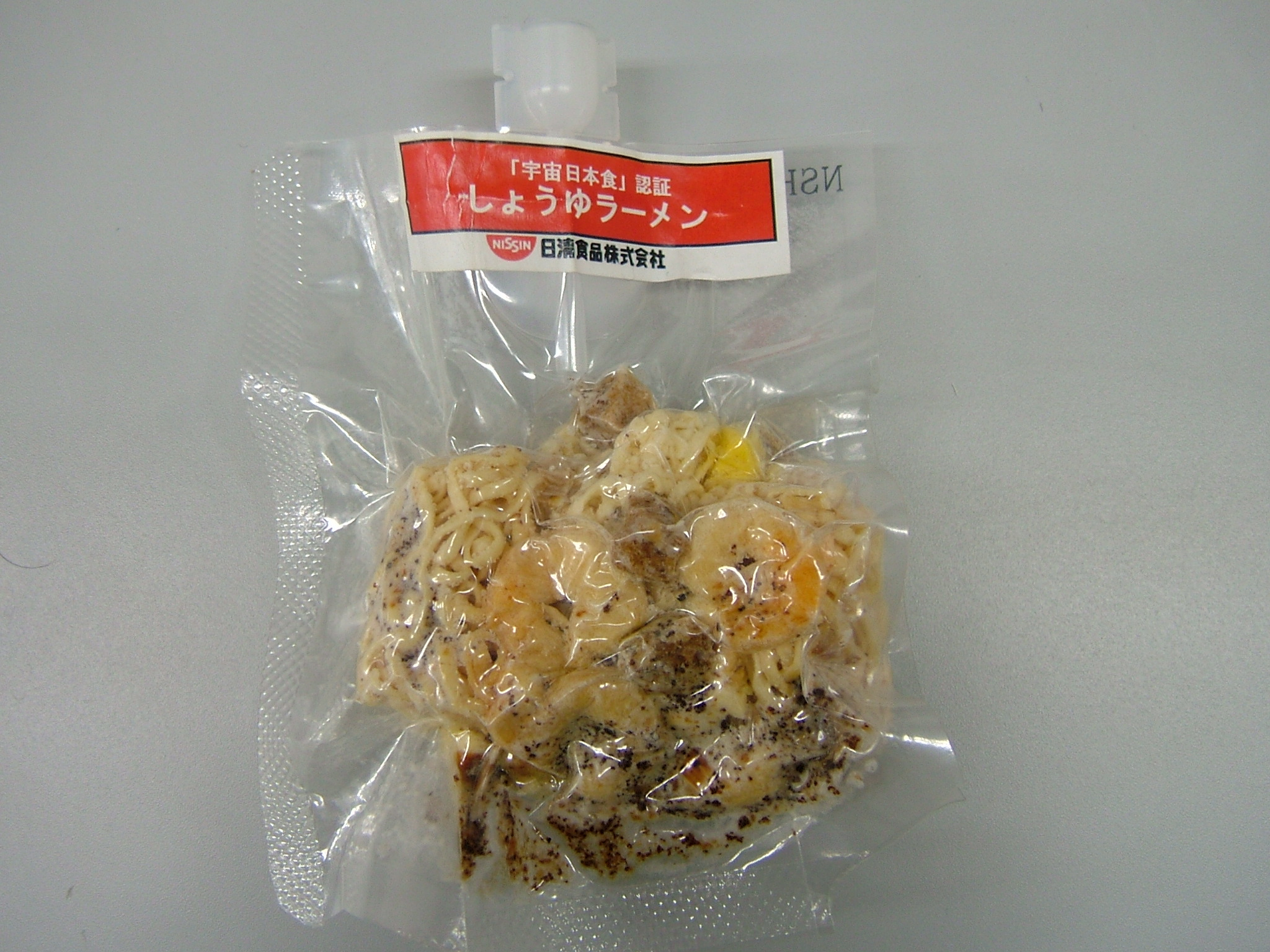 宇宙日本食しょうゆラーメン（筑波宇宙センター特別公開時に撮影）